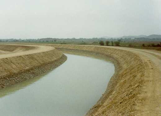 Canal principal de riego. Canal principal de riego en operación Lugar: norte del Perú Autor: Alfredobi Fecha: aprox. 1999